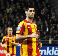 Rabi Elia